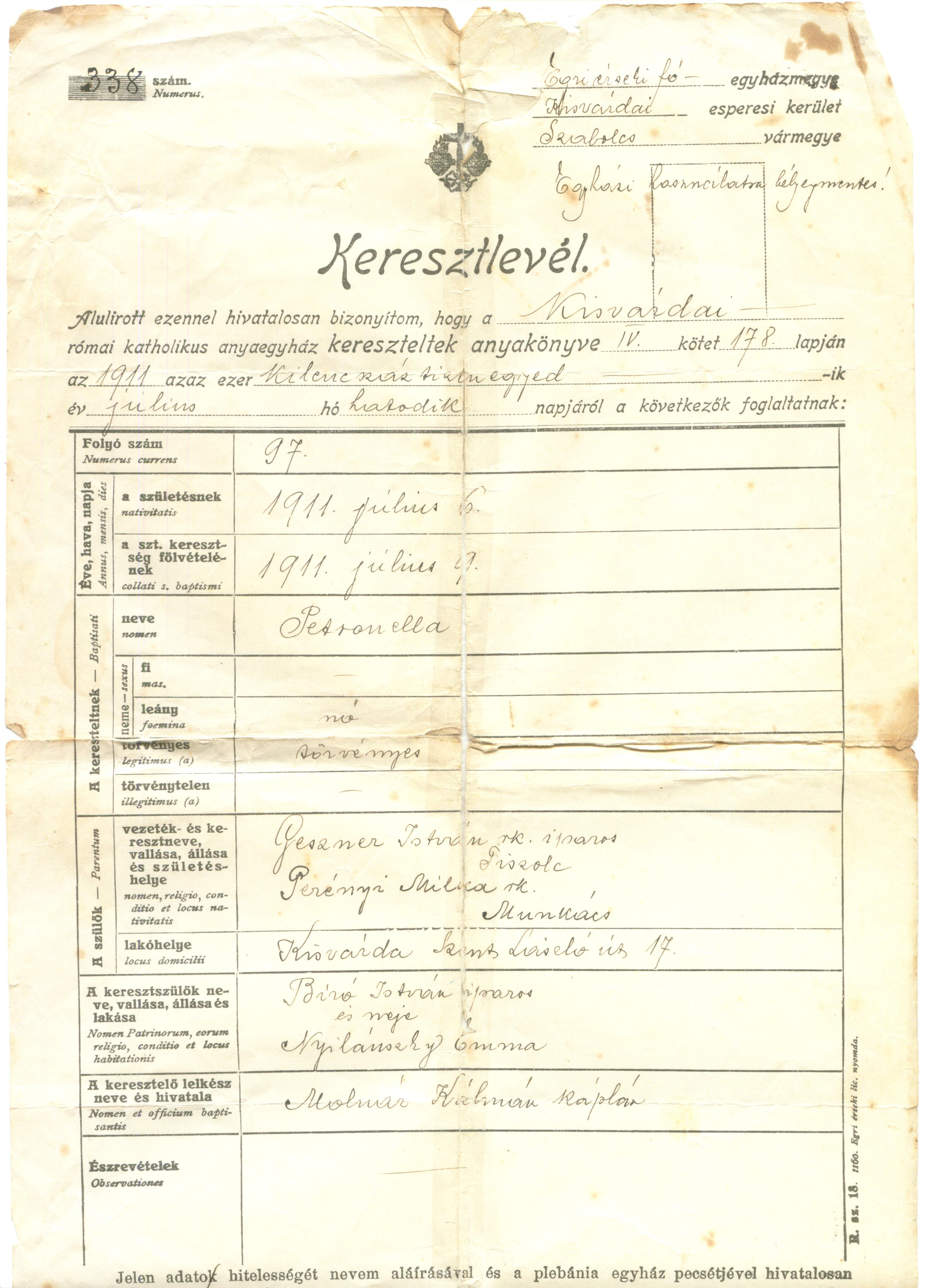 eredeti